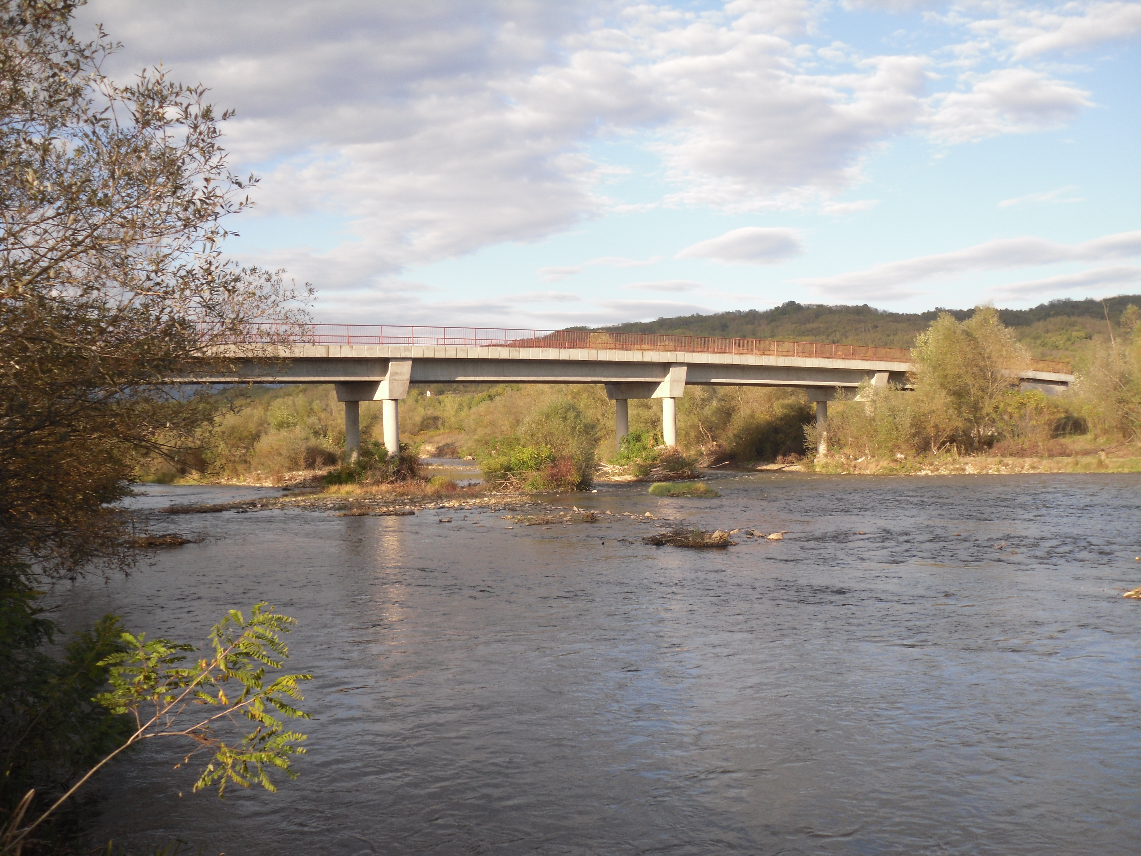 Srpski (latinica): Most preko Južne Morave.